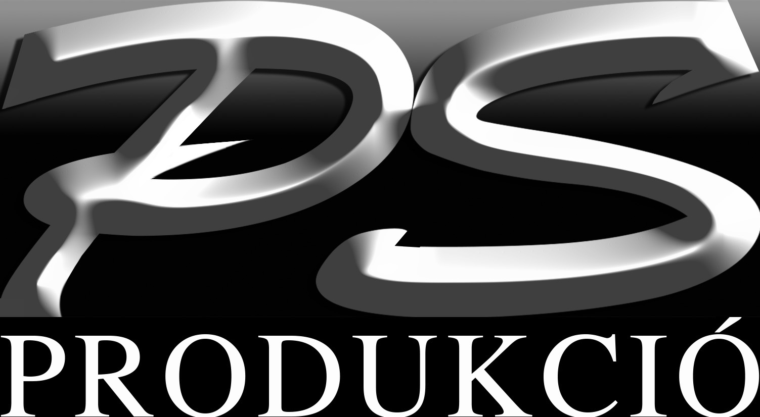 PS Produkció